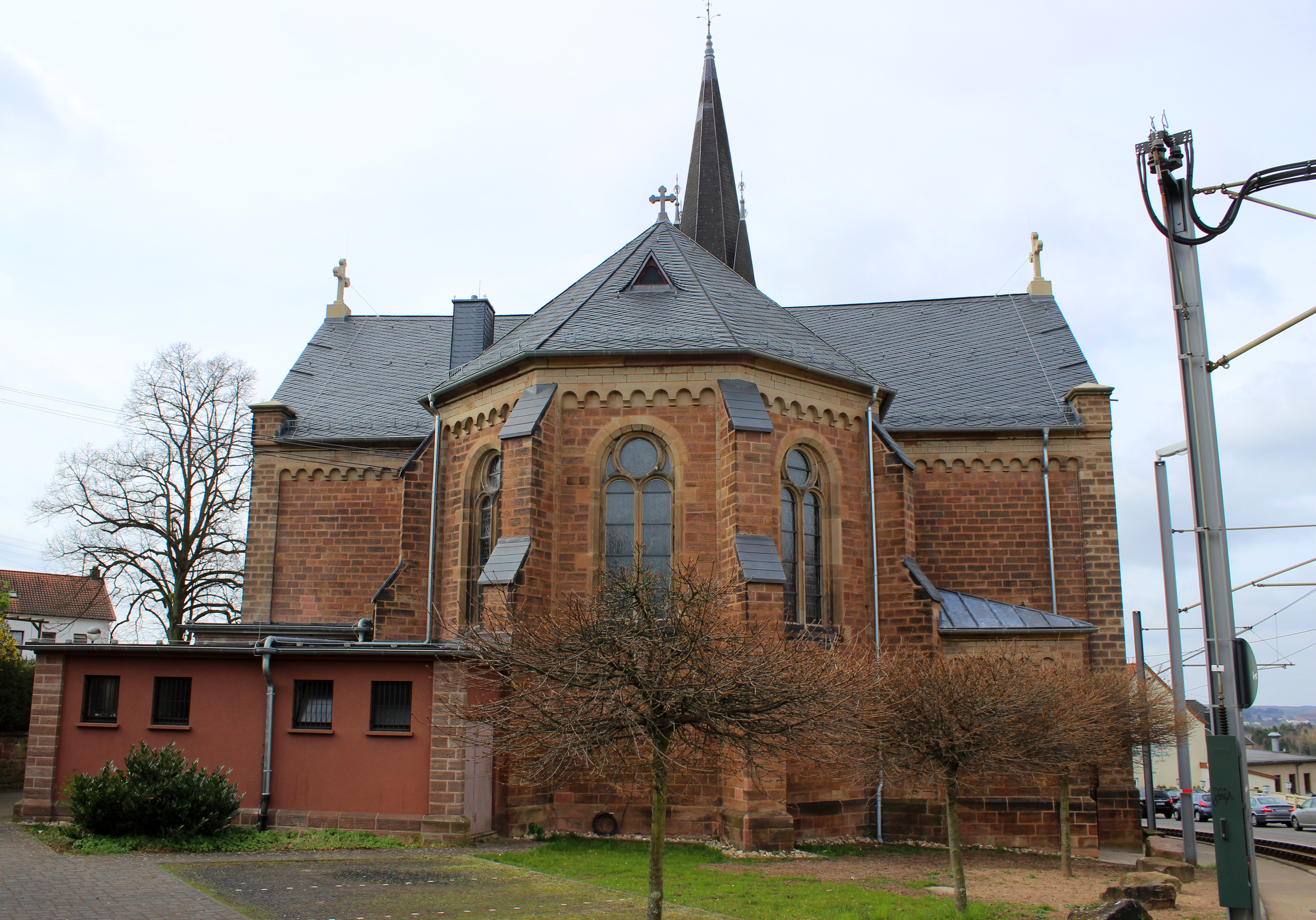 Die katholische Pfarr- und Wallfahrtskirche St. Josef in Riegelsberg, Regionalverband Saarbrücken, Saarland